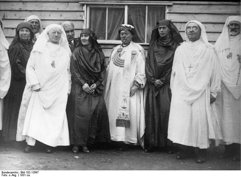 Der Duke of York, der zweitälteste Sohn des englischen Königs, mit seiner Gattin in exotischer Tracht! Der englische Duke of York und seine Gattin Elisabeth in der schwarzen Ehrenrobe beim Empfang einer arabischen [sic] Abordnung in London. (Diese Fotographie zeigt wirklich den Herzog und die Herzogin mit der Waliser-kulturellen Organisation, das " Gorsedd von Bards" , verantwortlich für das Organisieren des jährlichen Waliser-Sprachpoesie- und -musikfestivals bekannt als der "Eisteddfod".) Information added by Wikimedia users.The Duke and Duchess of York (later George VI and Queen Elizabeth) in the robes of the Gorsedd of Bards